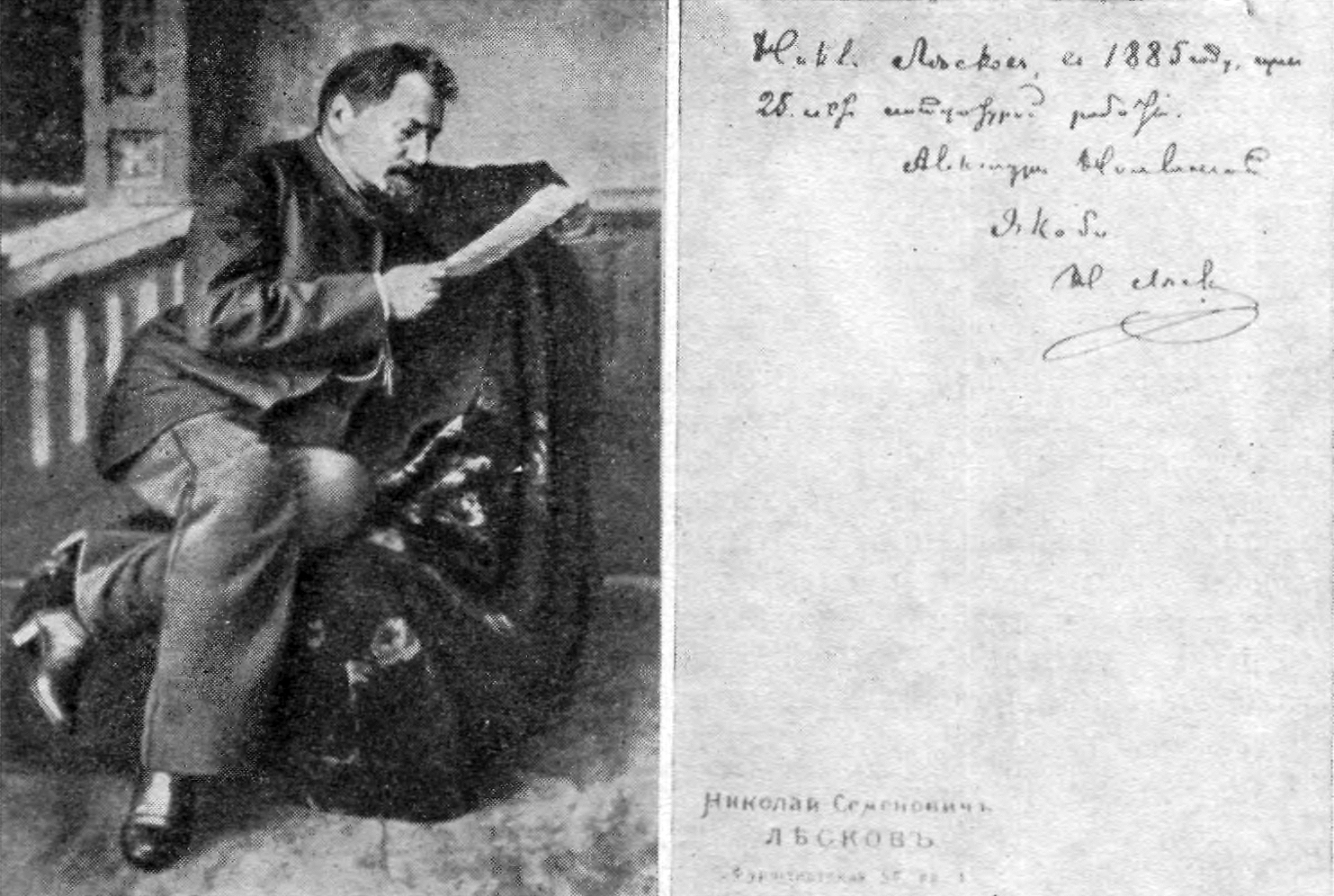 Фотография Н. С. Лескова с дарственной надписью А. Н. Пешковой-Толиверовой (Якоби)